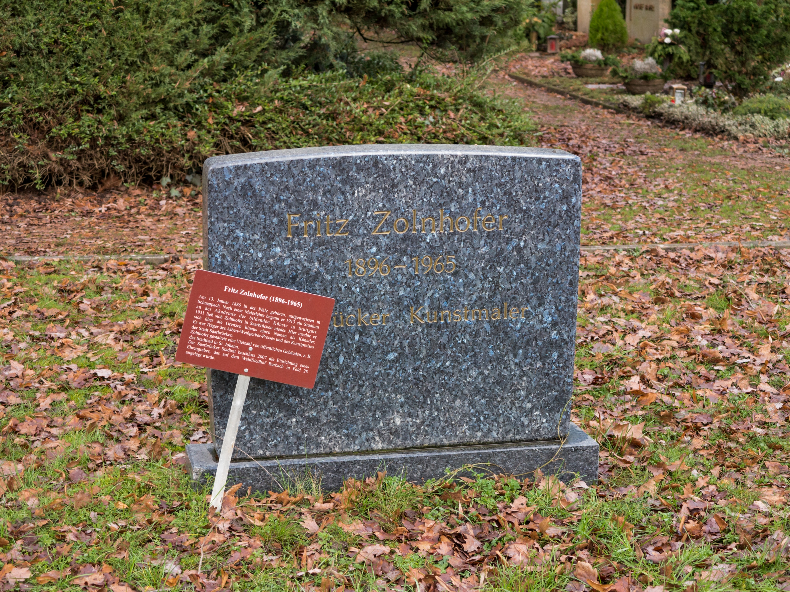 Das Ehrengrab des Malers Fritz Zolnhofer auf dem Waldfriedhof im Saarbrücker Stadtteil Burbach.